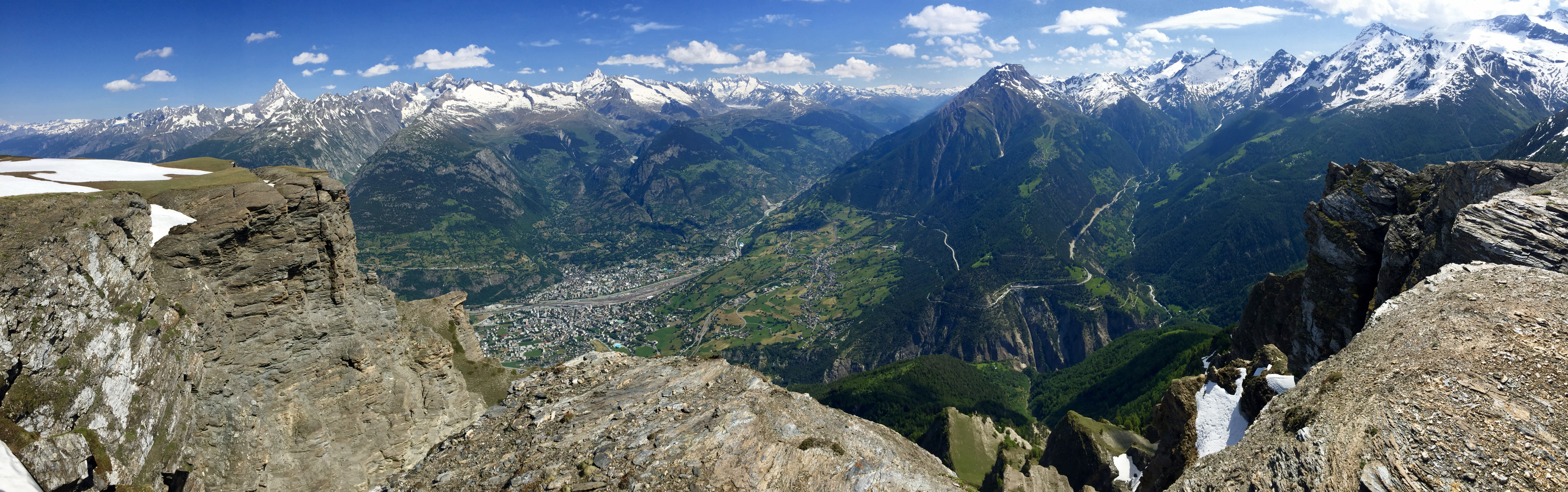 Panorama vom Glishorn-Gipfel in Richtung Westen mit Brig und Naters im Tal und dem Fülhorn in der Bildmitte. Im rechten Bereich ist das Gantertal mit der Simplon-Passstrasse sichtbar